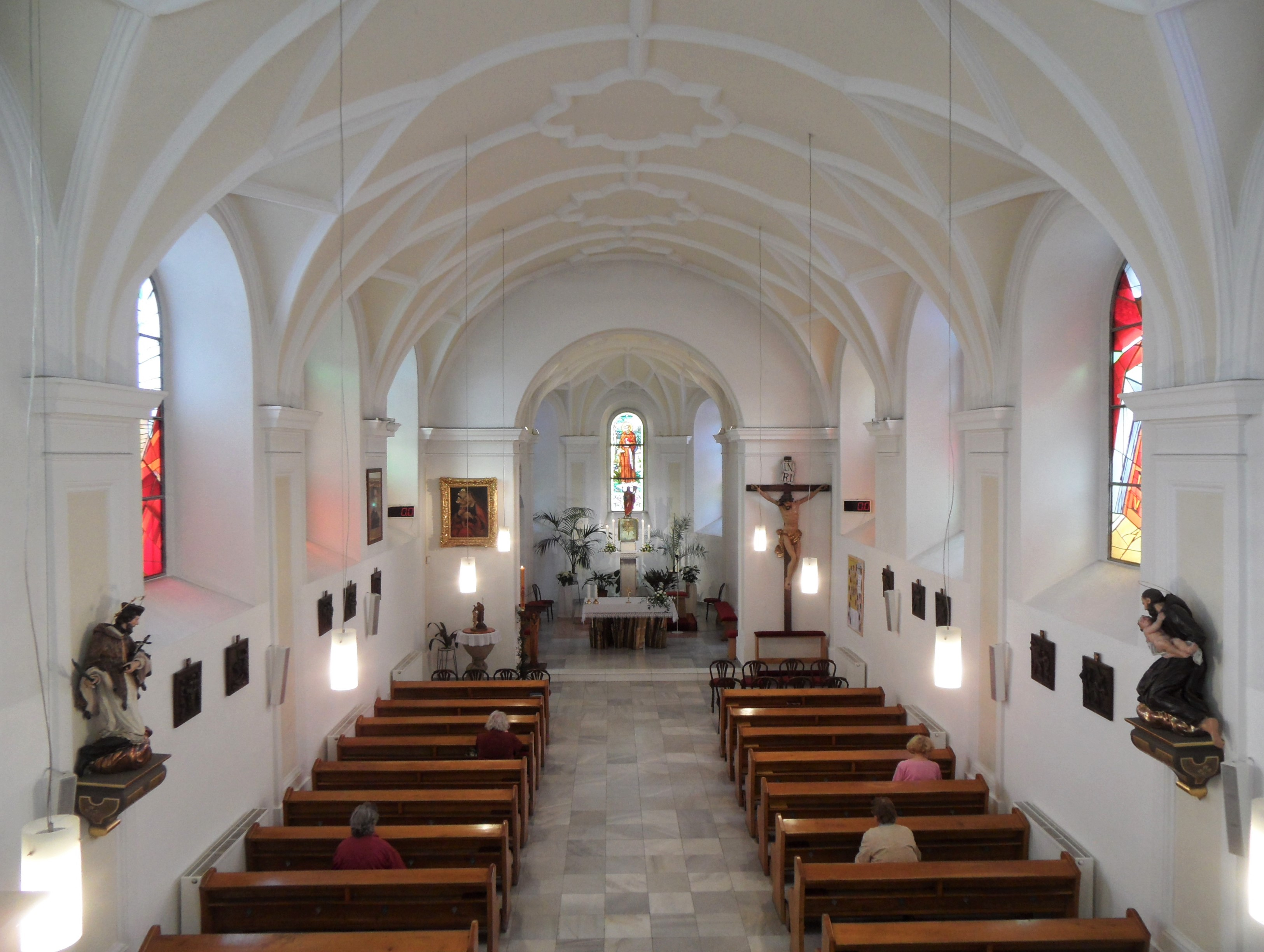 Kostel sv. Jiljí, Brno-Líšeň - interiér